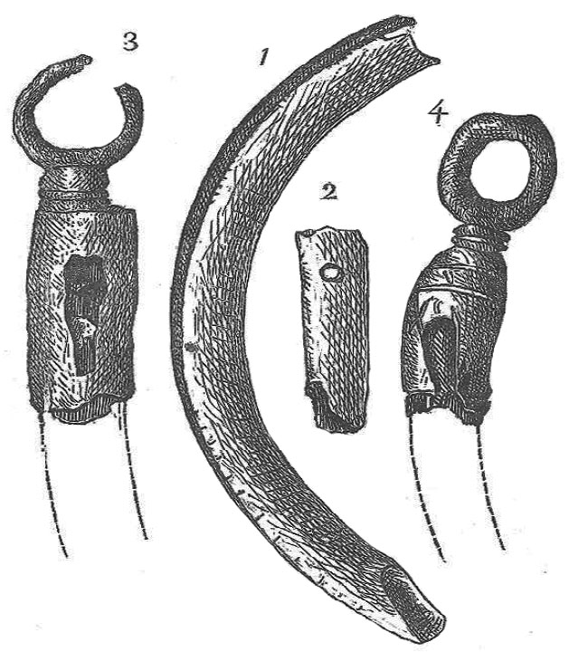 D'après une illustration de Gabriel De Mortillet (article de 1872) présentant : 1) une canine inférieure de Castor fiber (trouvé dans les tourbières de la Somme à Abbeville) ; 2) un fragment de canine avec trou de suspension (sépulture de Chassemy ; 'Aisne, Région Picardie) ; 3) une monture en bronze enchassant une canine de castor. Pièce conservée au musée des antiquités nationales de Saint-Germain (gaîne triangulaire, ayant sur chaque face une ouverture qui était remplie de pâte de couleur) ; A l'intérieur on aperçoit encore la base de la dent de castor. Cette pièce provient de la Collection de Mme Lefebvre de Mâcon, et a probablement été trouvée dans la vallée de la Saône ; 4) Une monture en bronze d’une canine de castor. La monture a la forme d'une griffe à trois doigts, pinçant la base d'une canine de castor. Pièce trouvée par M. de Rouçy dans. les fouilles du Mont-Berny, en forêt de Compiègne (Oise), pièce conservée au musée des antiquités nationales de Saint-Germain